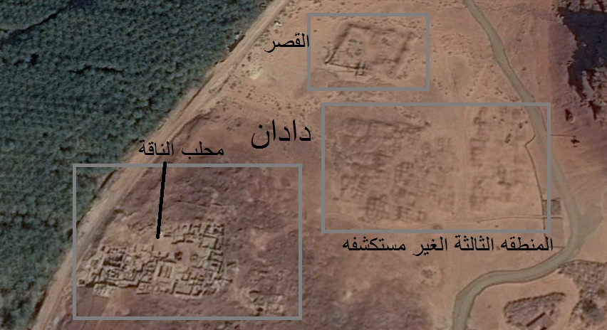 صورة عبر الاقمار الصناعية لموقع دادان